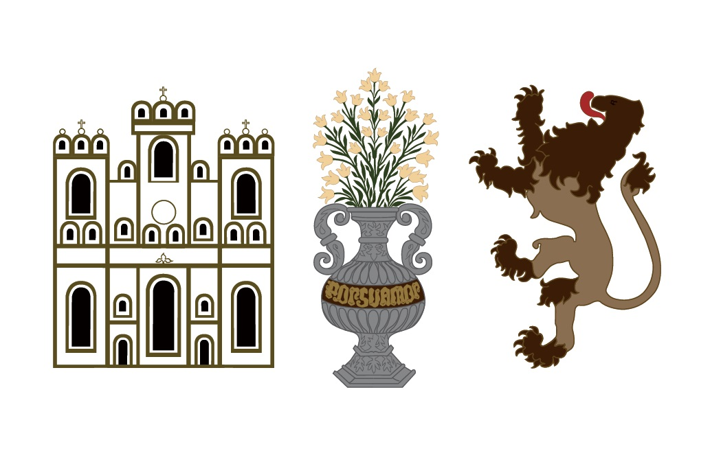 Bandera de la Ciudad de Antequera